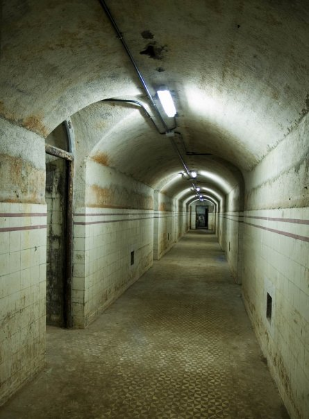 Tunel de la Posición Jaca en la Alameda de Osuna